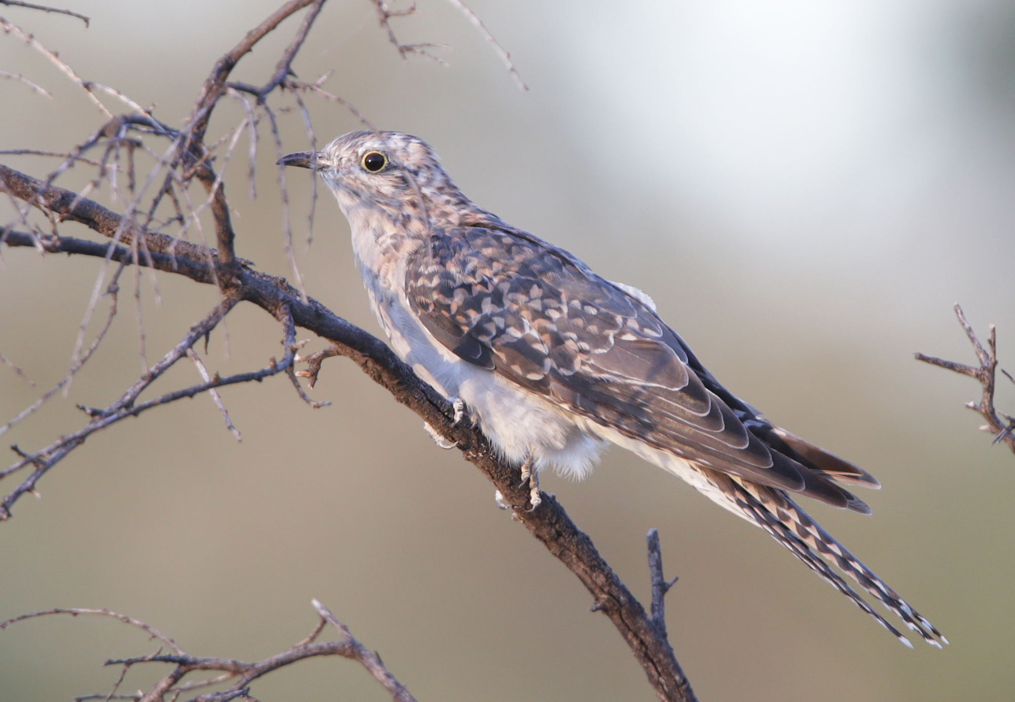 Pallid Cuckoo